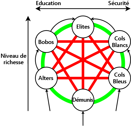 Diagramme représentant les interactions entre les différentes classes sociales dans le jeu vidéo City Life.